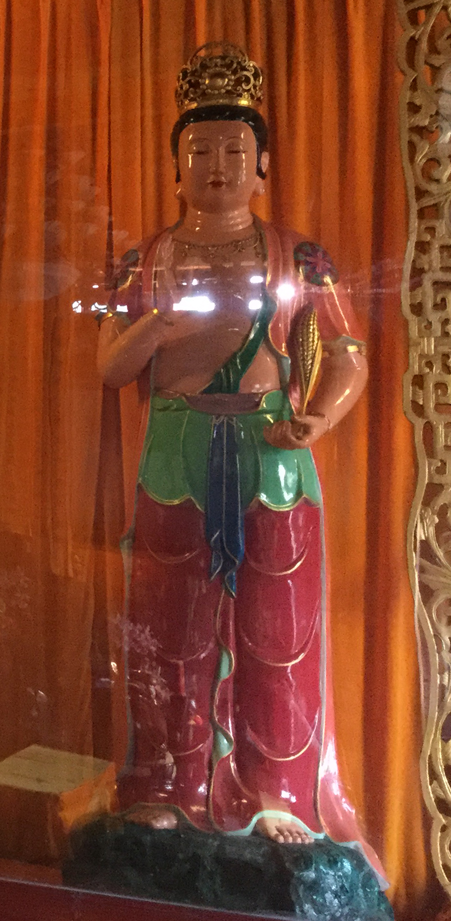 中文（中国大陆）: 大自在天，位于汕头天坛花园九天禅院。